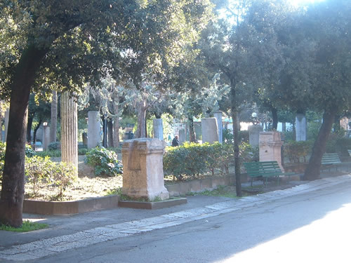 Lapidarium (2007)